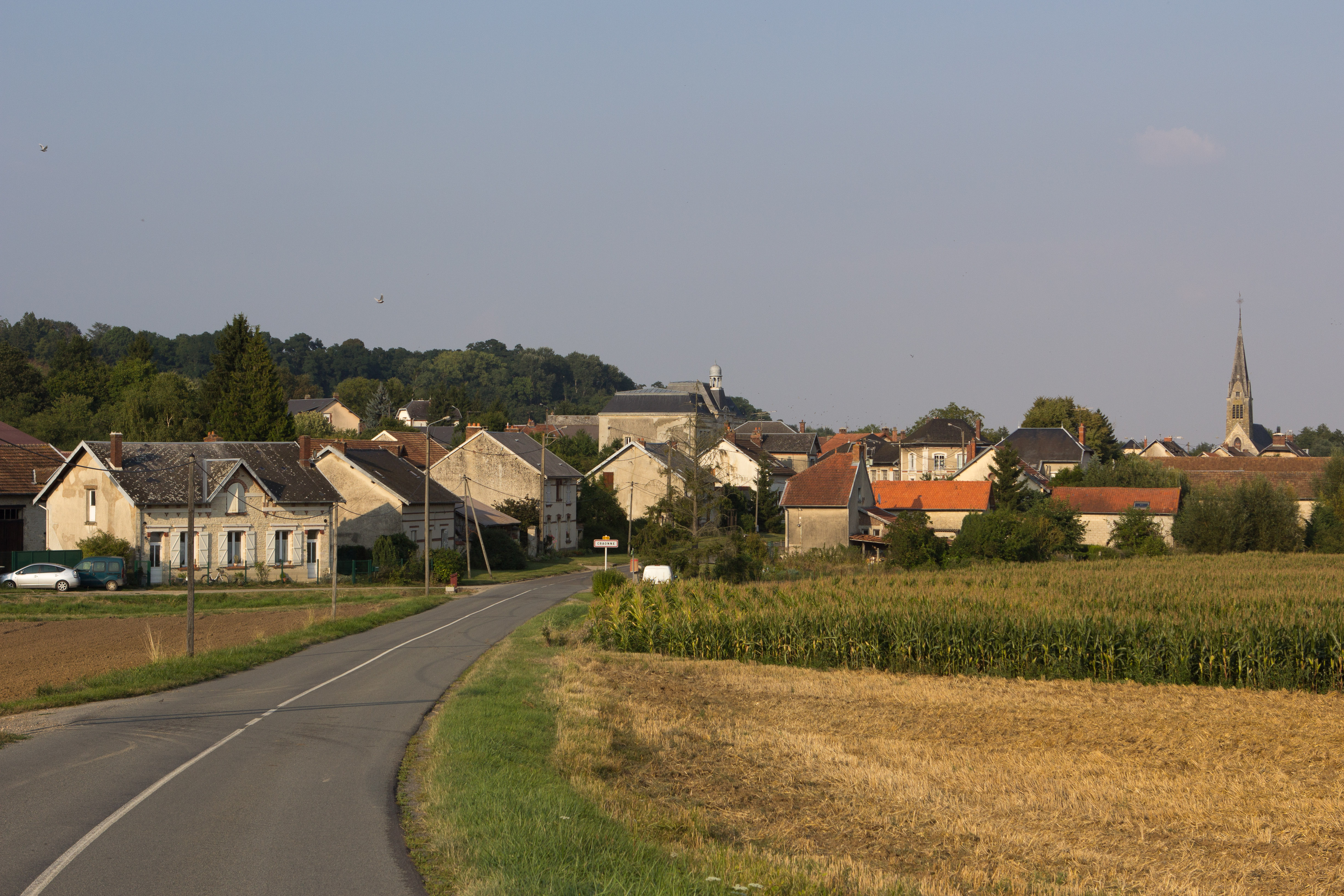 Entrée ouest de Craonne, RD18 en venant de Craonnelle / Craonne, Aisne, France